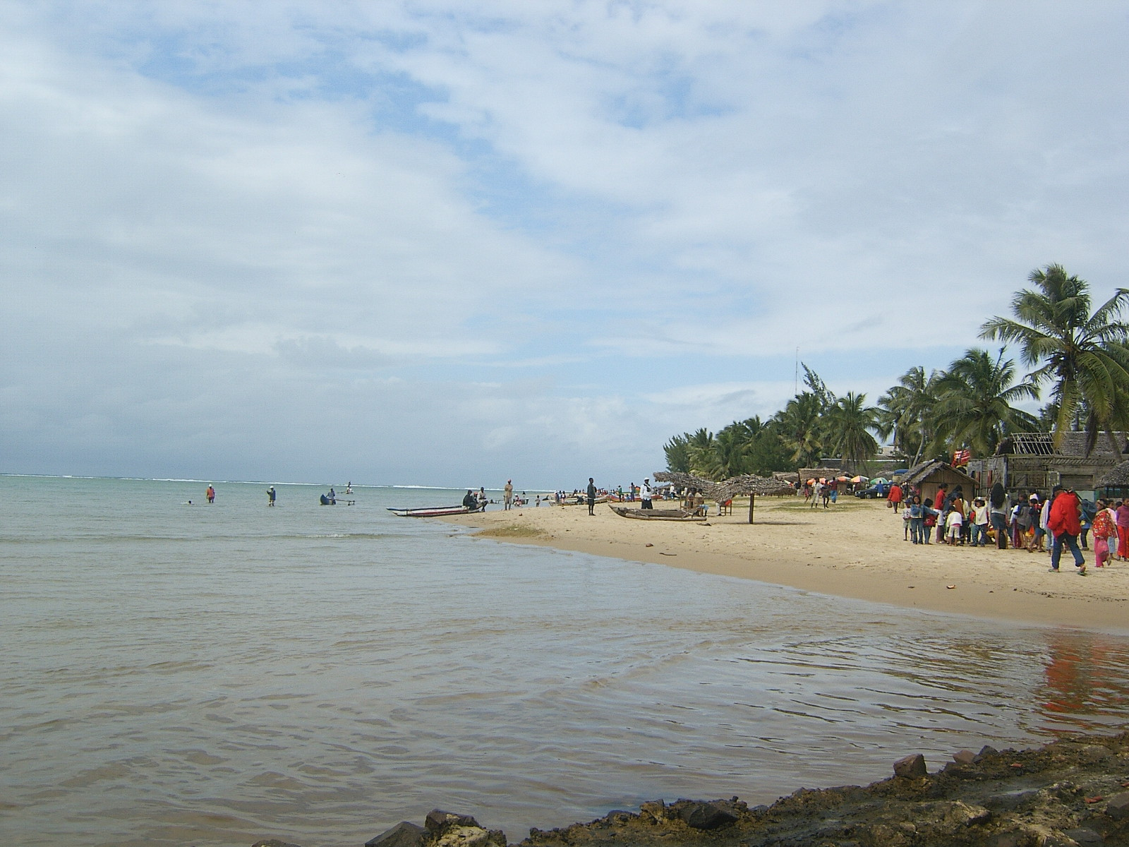 la plage de Full Point